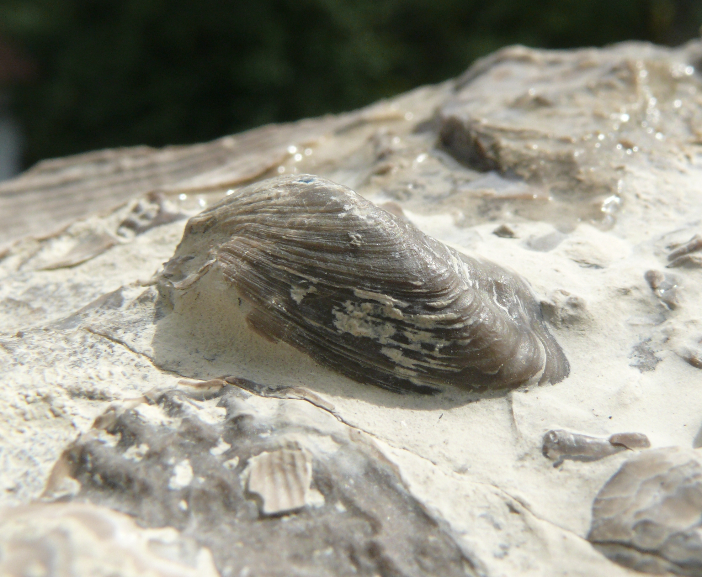 Hoernesia socialis, Trcohitenkalk, Oberer Muschelkalk Hohenlohe, Germany